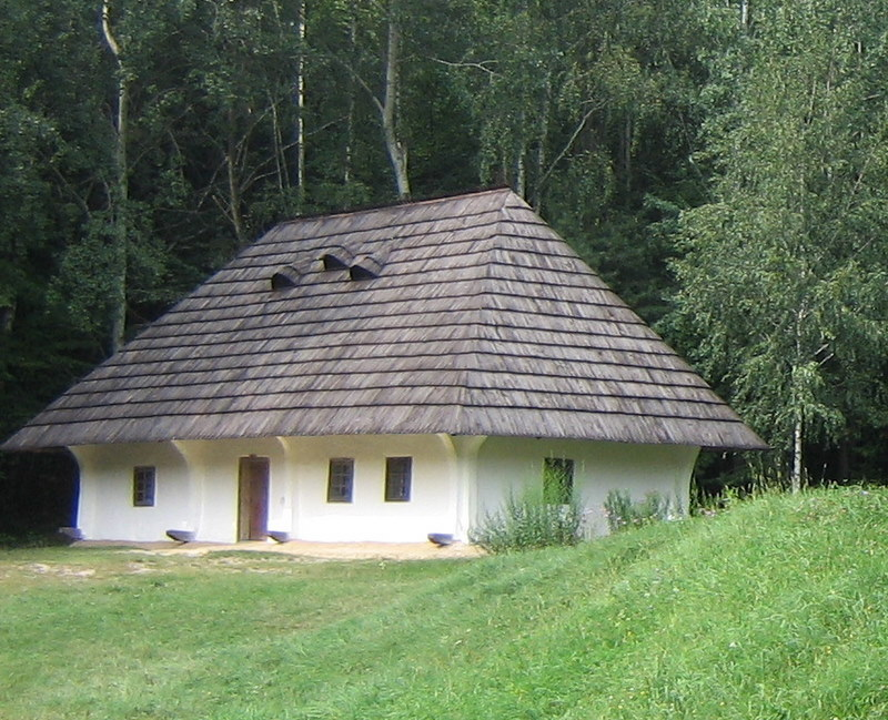 Музей народної архітектури та побуту в Києві, сектор Буковина. Хата з с. Великий Кучурів. Хата з с. Великий Кучурів Чернівецької області, Буковина.